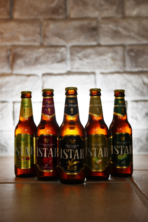 istak